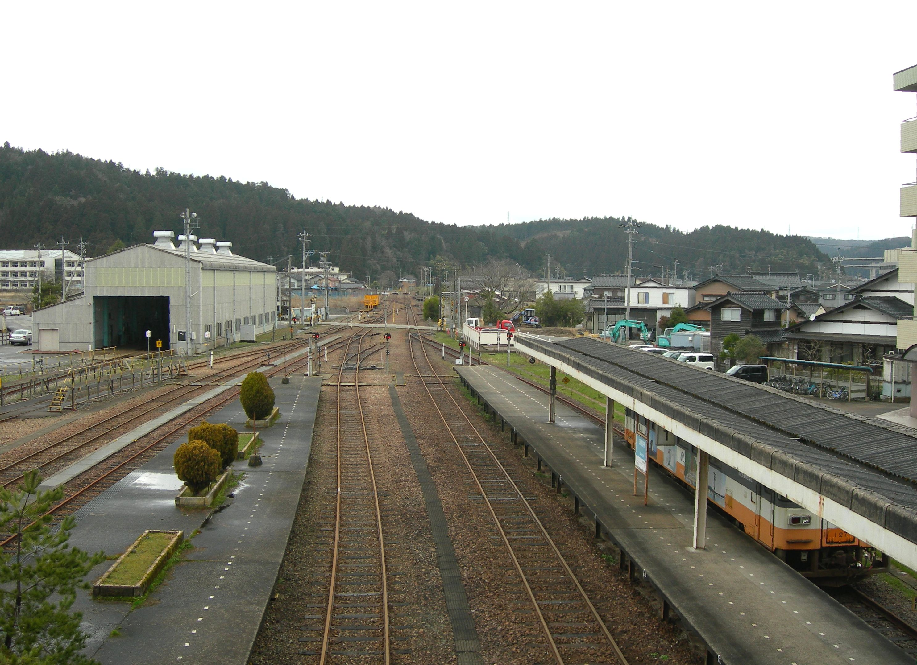 穴水駅構内、車止めの方向を撮る